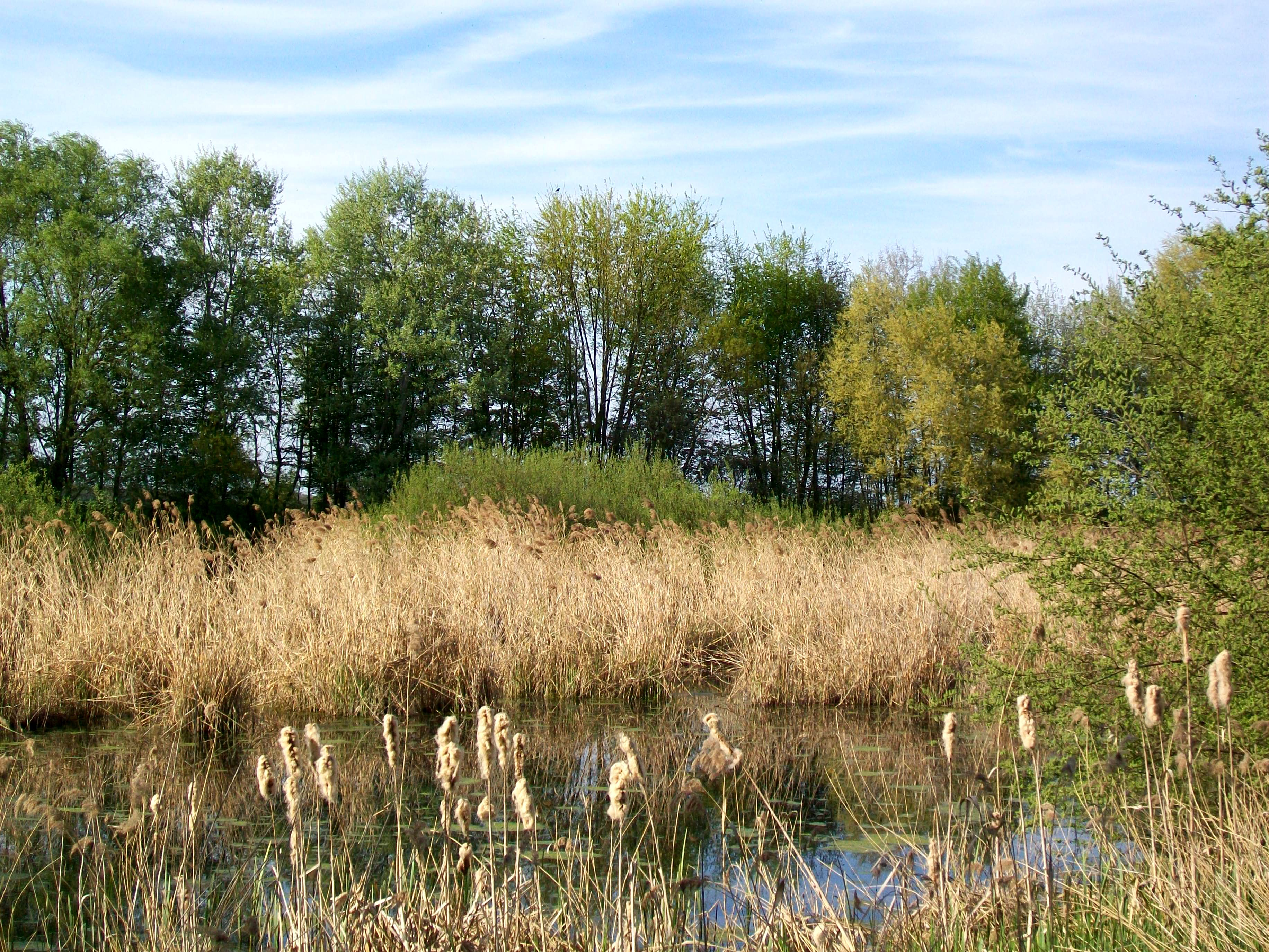 La mare blanche ou la mare Blaine, près de la D 922 à mi-chemin entre Survilliers et Plailly, et à côte de la zone d'activités du Pré de la Dame Jeanne.